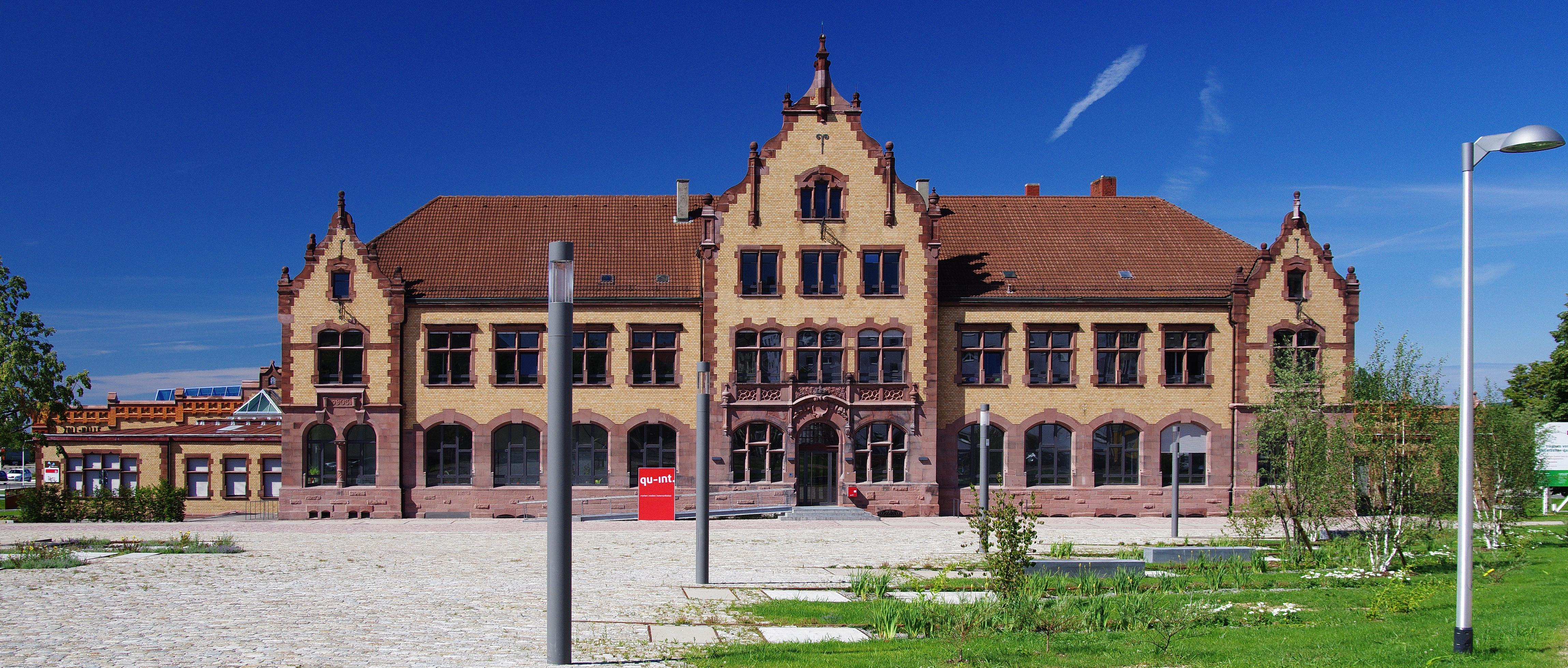 Das Gebäude des ehemaligen Güterbahnhofs Freiburg nach dem Umbau